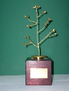 Comino de Oro, máxima distinción del Festival de la Canción Canela Canta en Verano